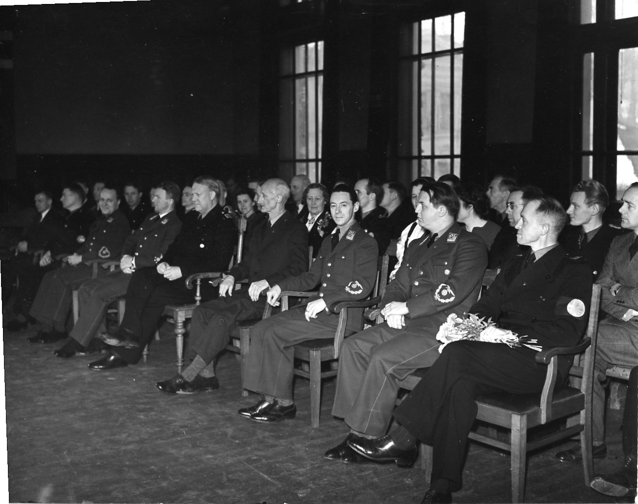 RA/RAFA-3309/U 39B/7 /39-7-8 img251